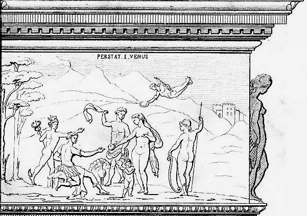 Zeichnung eines relief-verzierten Sandsteinkamins auf Schloss Hugenpoet in Essen-Kettwig